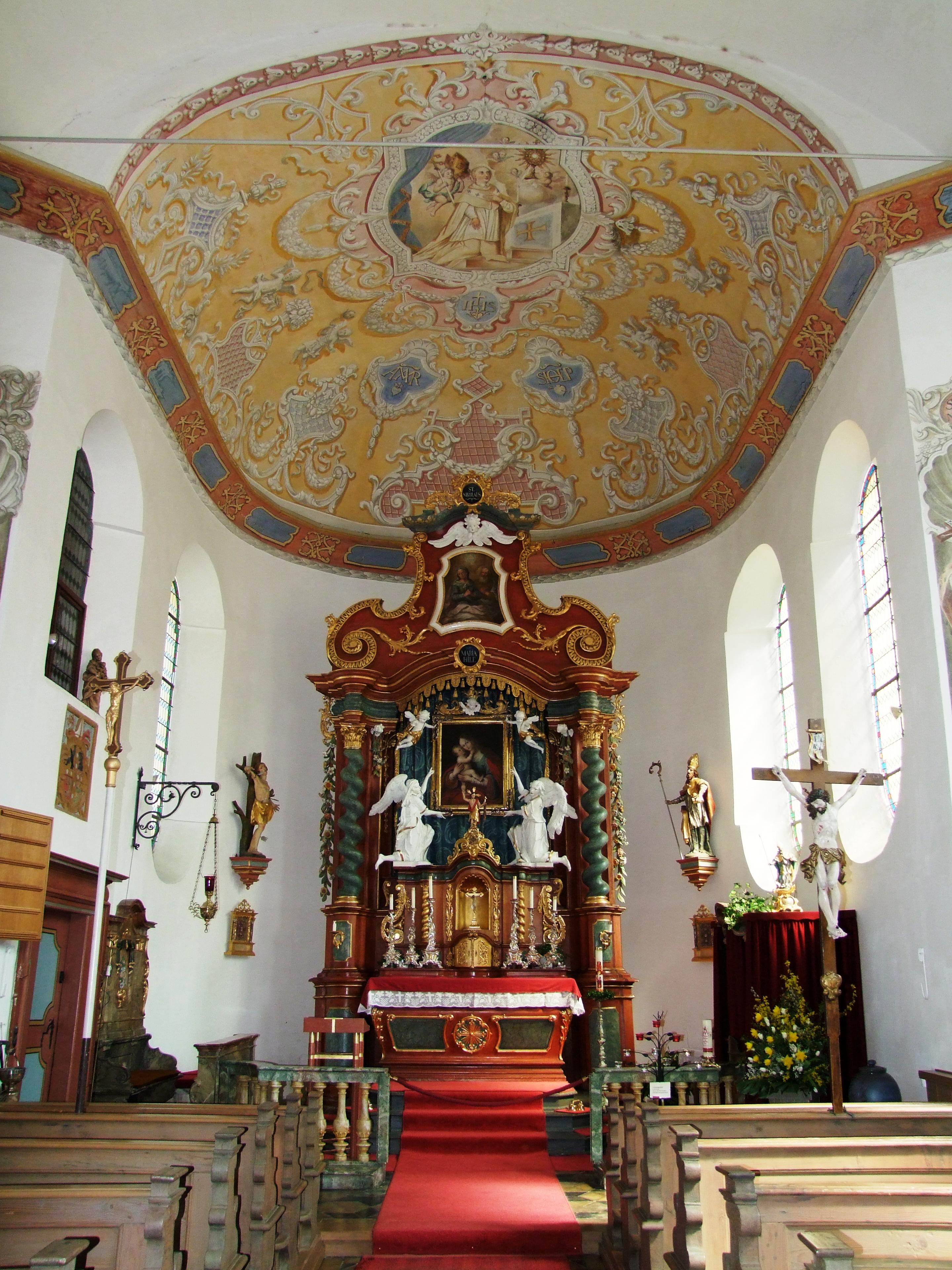 St. Nikolaus im oberschwäbischen Kardorf bei Memmingen.